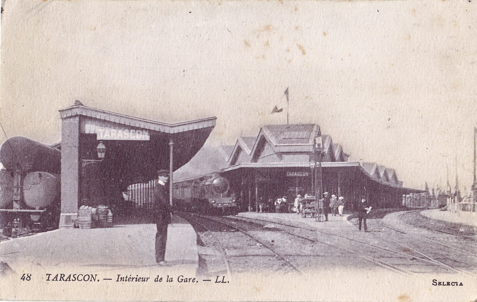 Carte postale ancienne éditée par LL & Sélecta, n°48 : TARASCON - Intérieur de la Gare